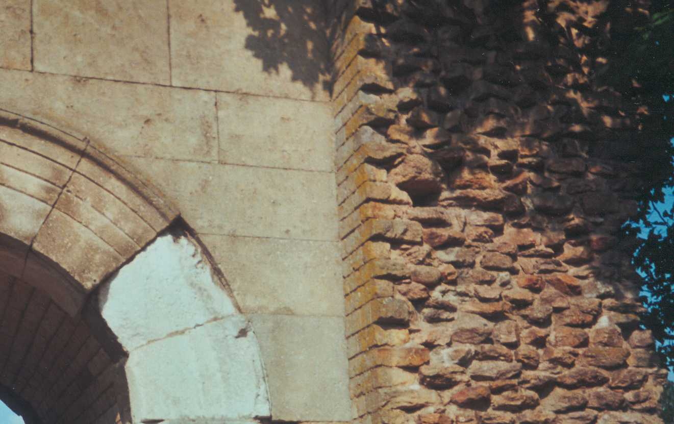 Date : 25 mai 2005, vers 17 h 00 Source : photo personnelle d'archeos Description : détail de la porte Saint-André d'Autun ; Licence : Mots clés : architecture gallo-romaine ; fortification ; appareil (architecture) ; grand appareil ; opus quadratum ; petit appareil ; blocage.